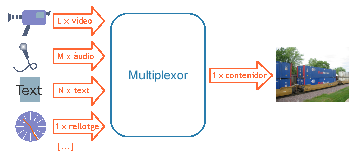 Multimedia Container Multiplexor Diagram.